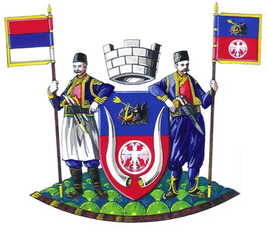 Coat of arms of Velika Plana, Serbia/Blason de Velika Plana, Serbie